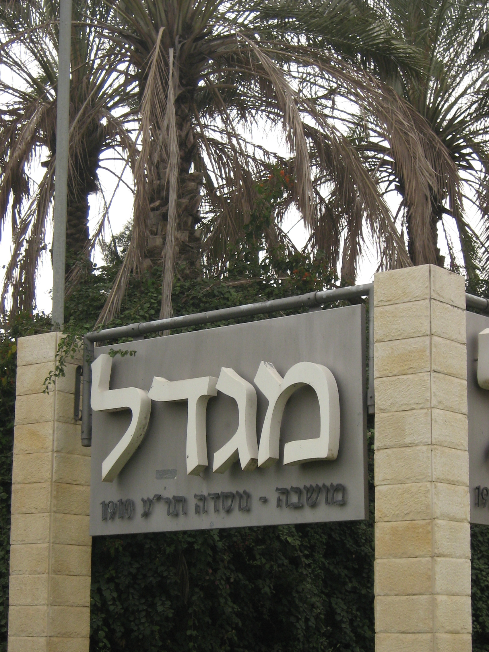 Schild am Ortseingang von Magdala (Israel).